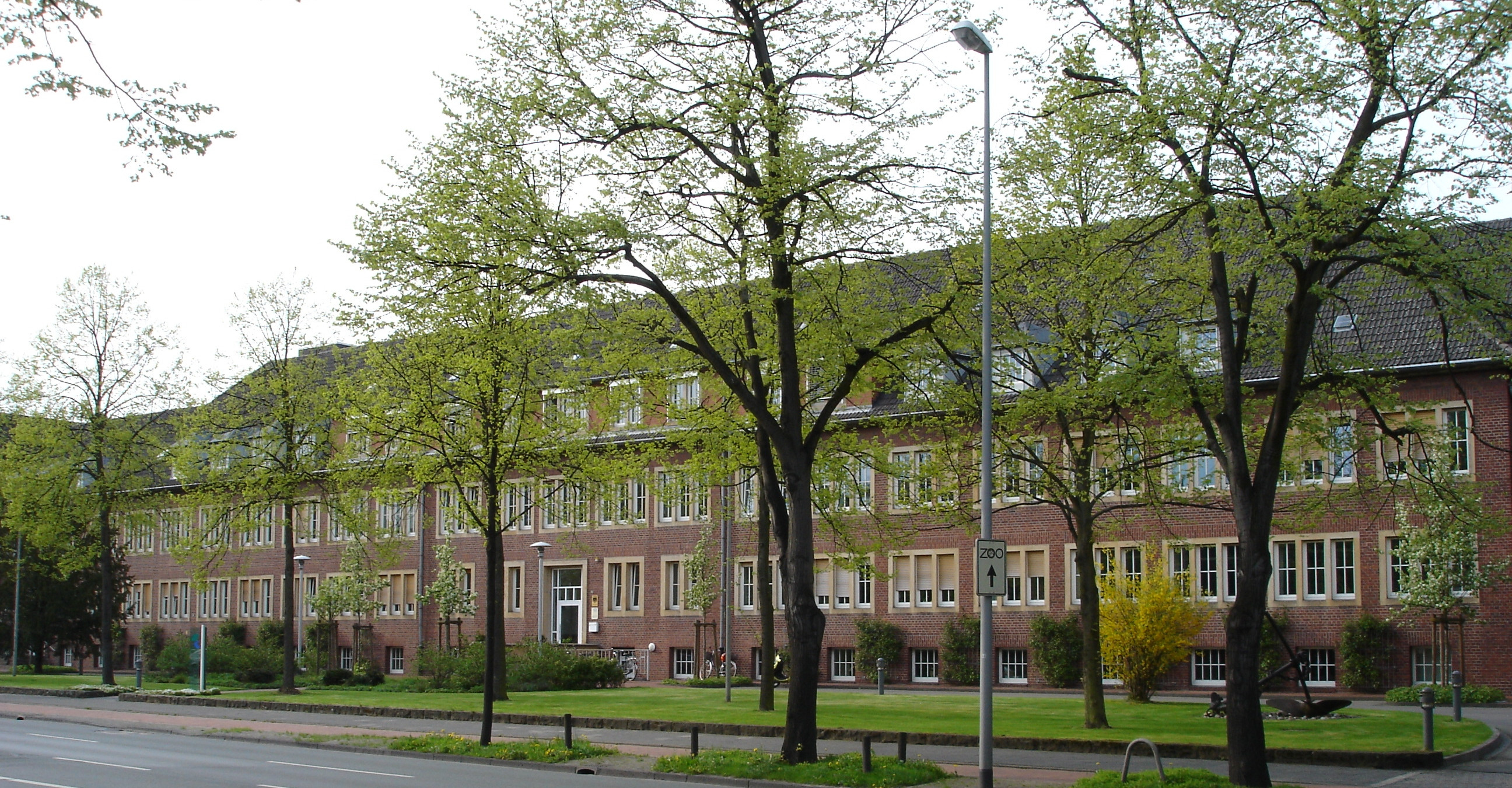 "Wasserschifffahrtsdirektion West", Cheruskerring 11, Münster, Westphalia, Germany